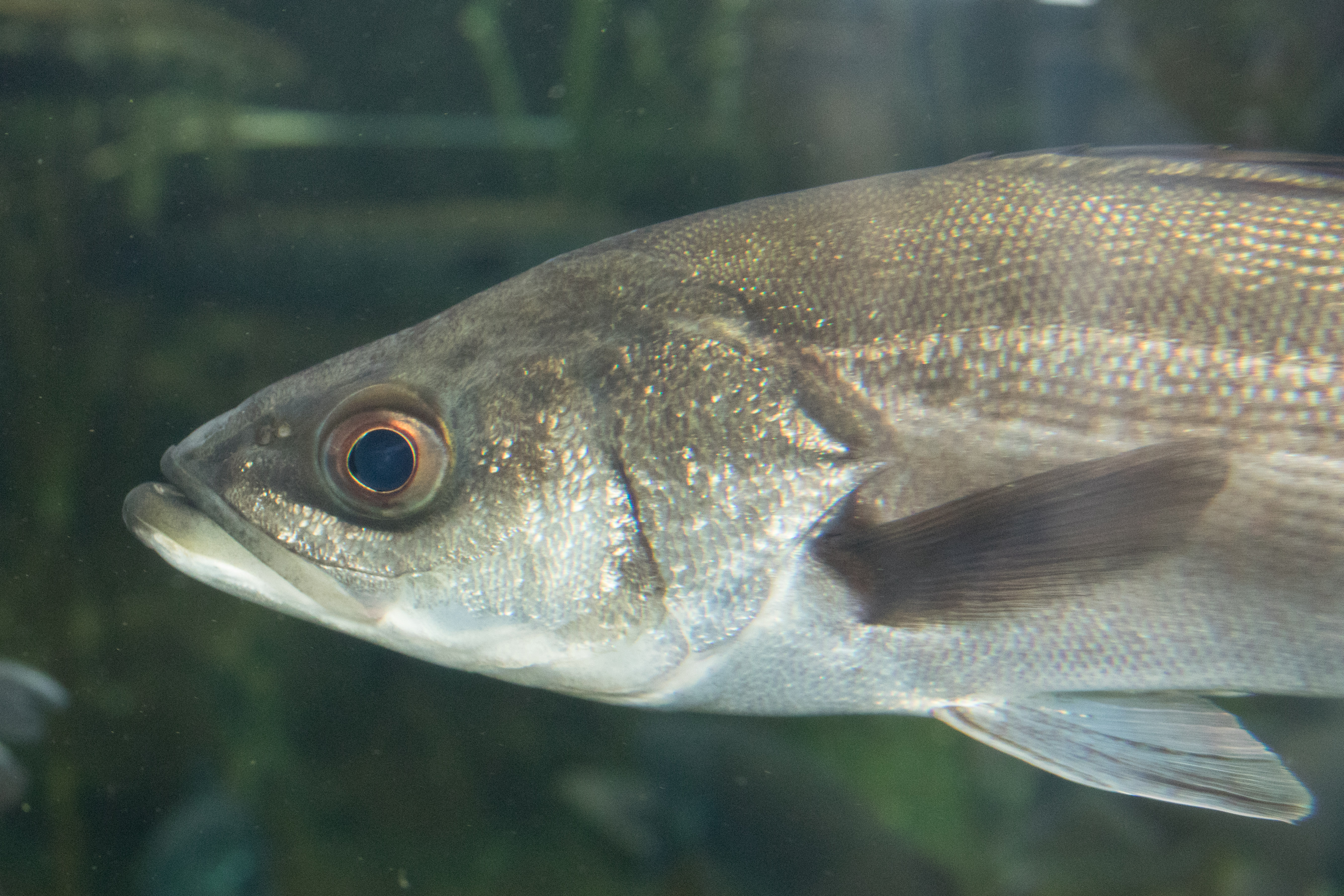 スズキ (学名:Lateolabrax japonicus)